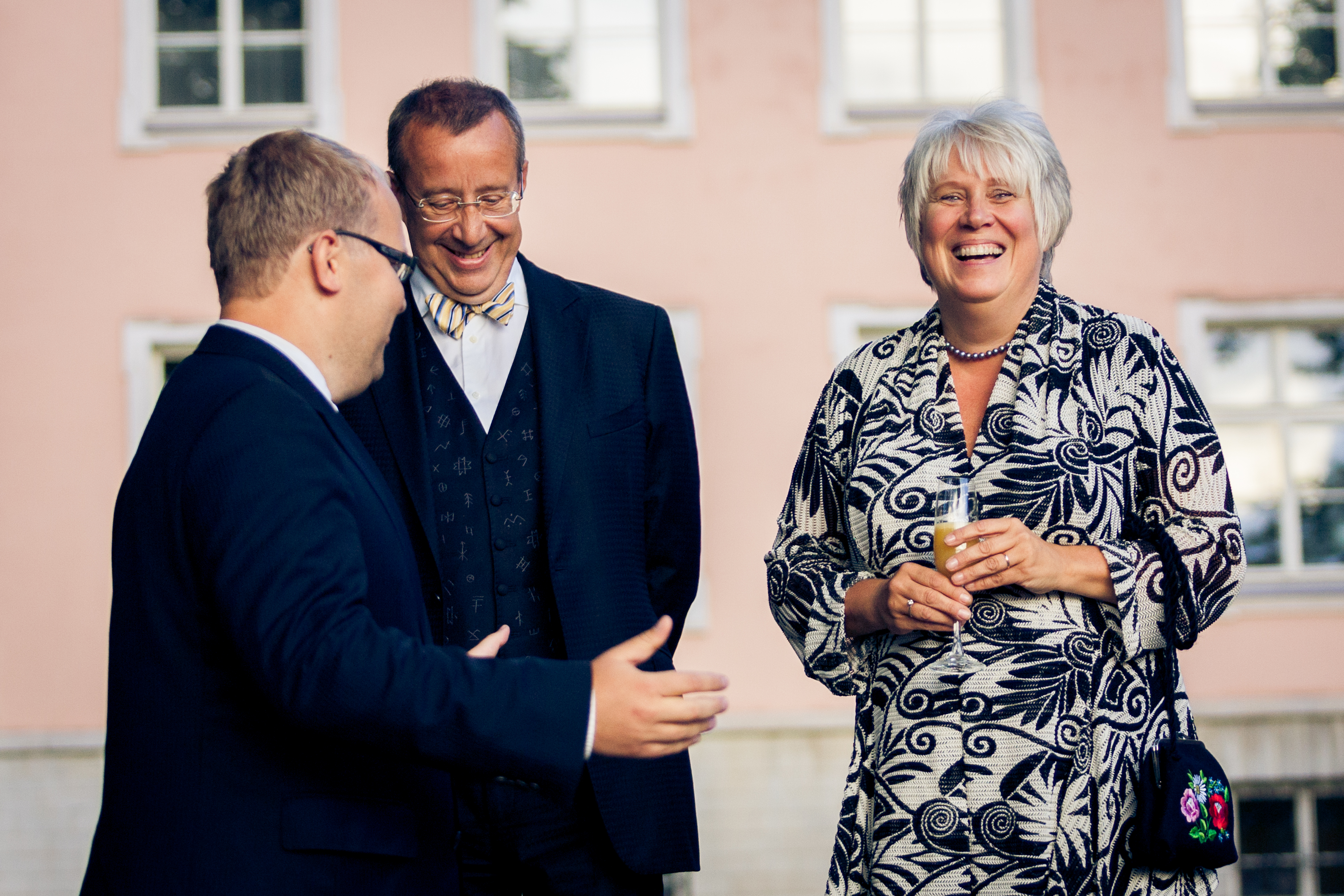 Marina Kaljurand (Eesti suursaadik Ameerika Ühendriikides ja Kanadas) koos Eesti Vabariigi presidendi ja välisministriga Kadriorus.